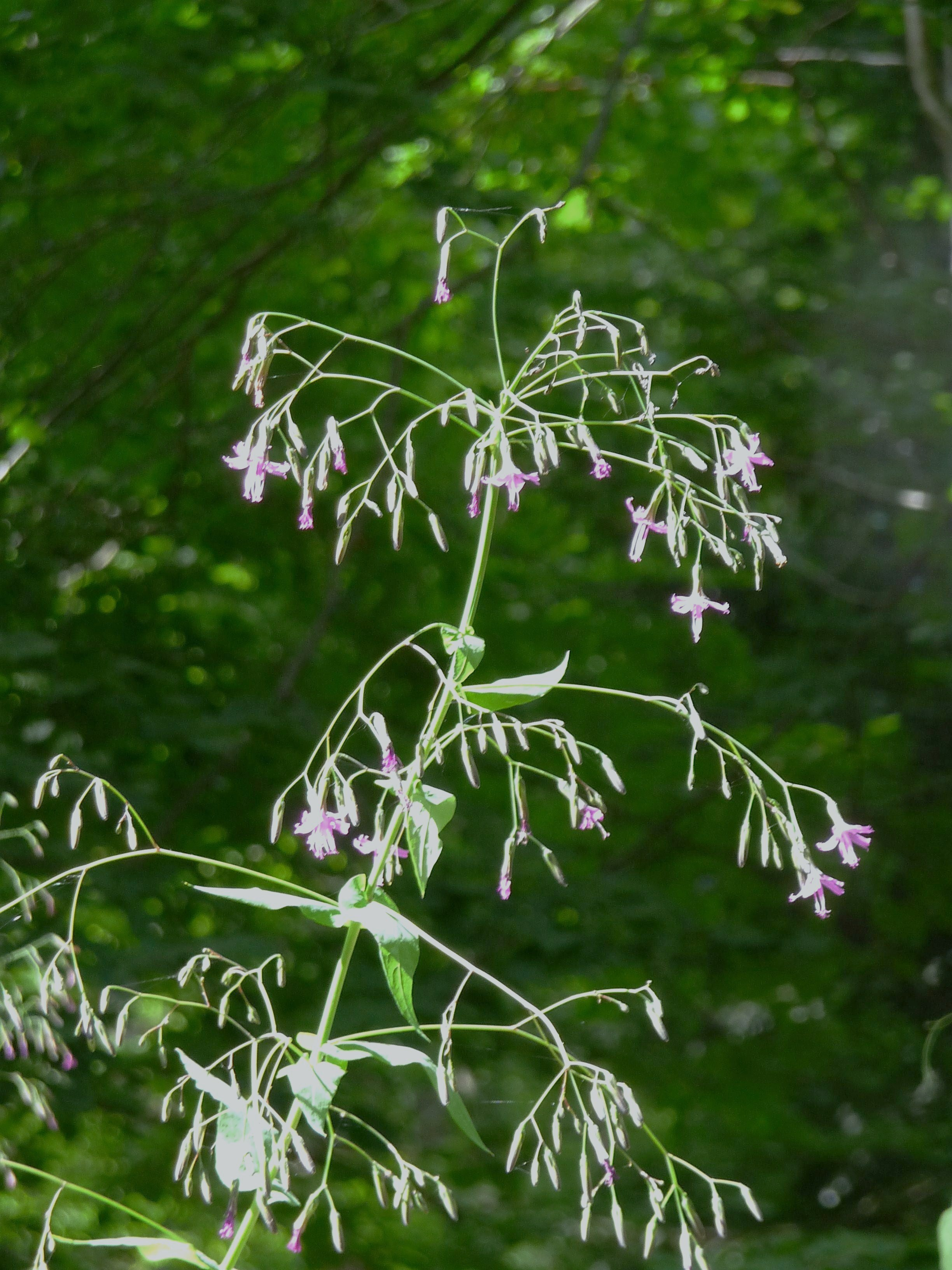 Hasenlattich, Bayerischer Wald bei Rabenstein, Stadt Zwiesel